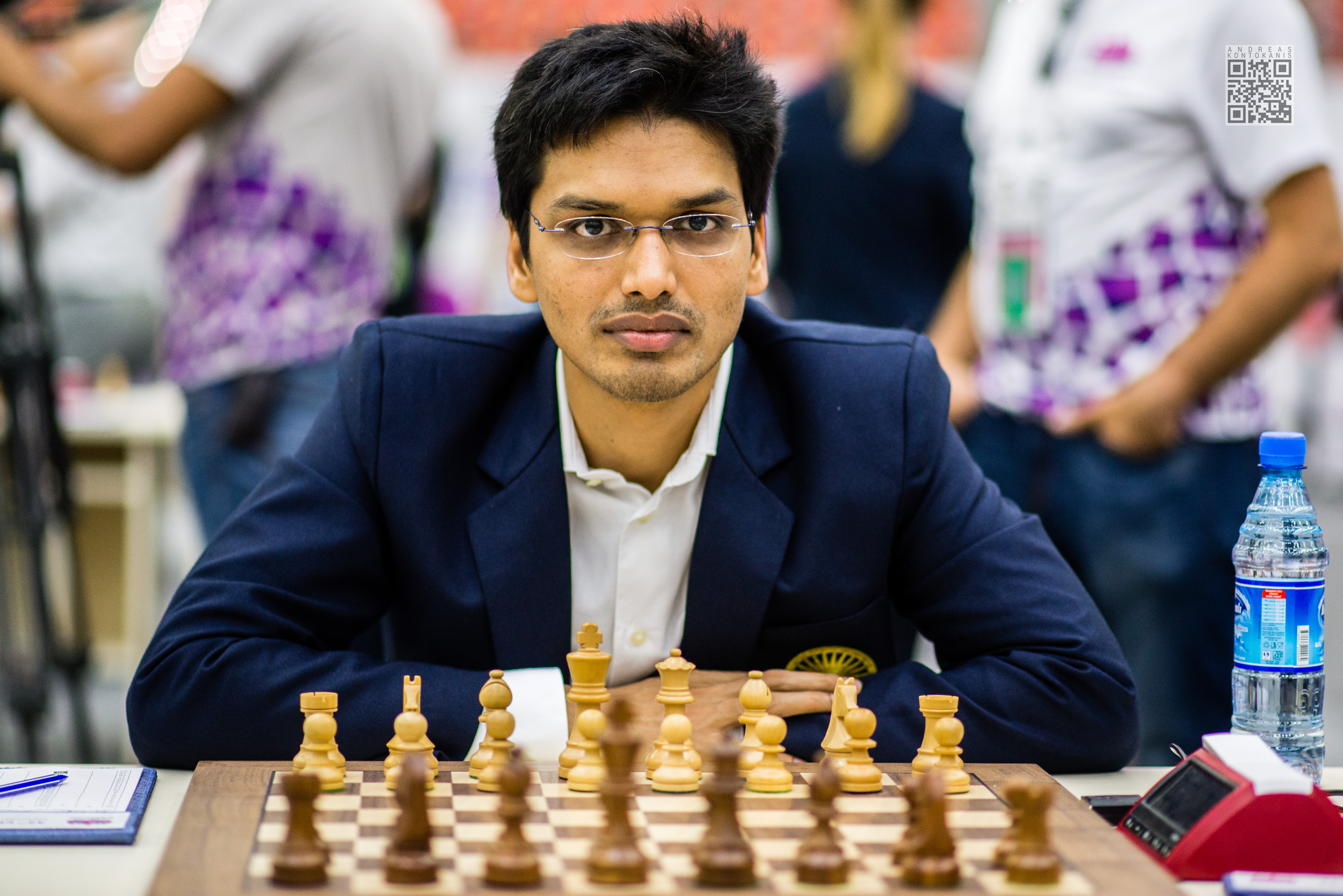 Harikrishna Pentala